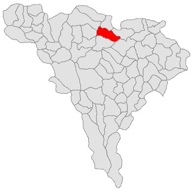 Categorie:Hărţi ale judeţului Alba